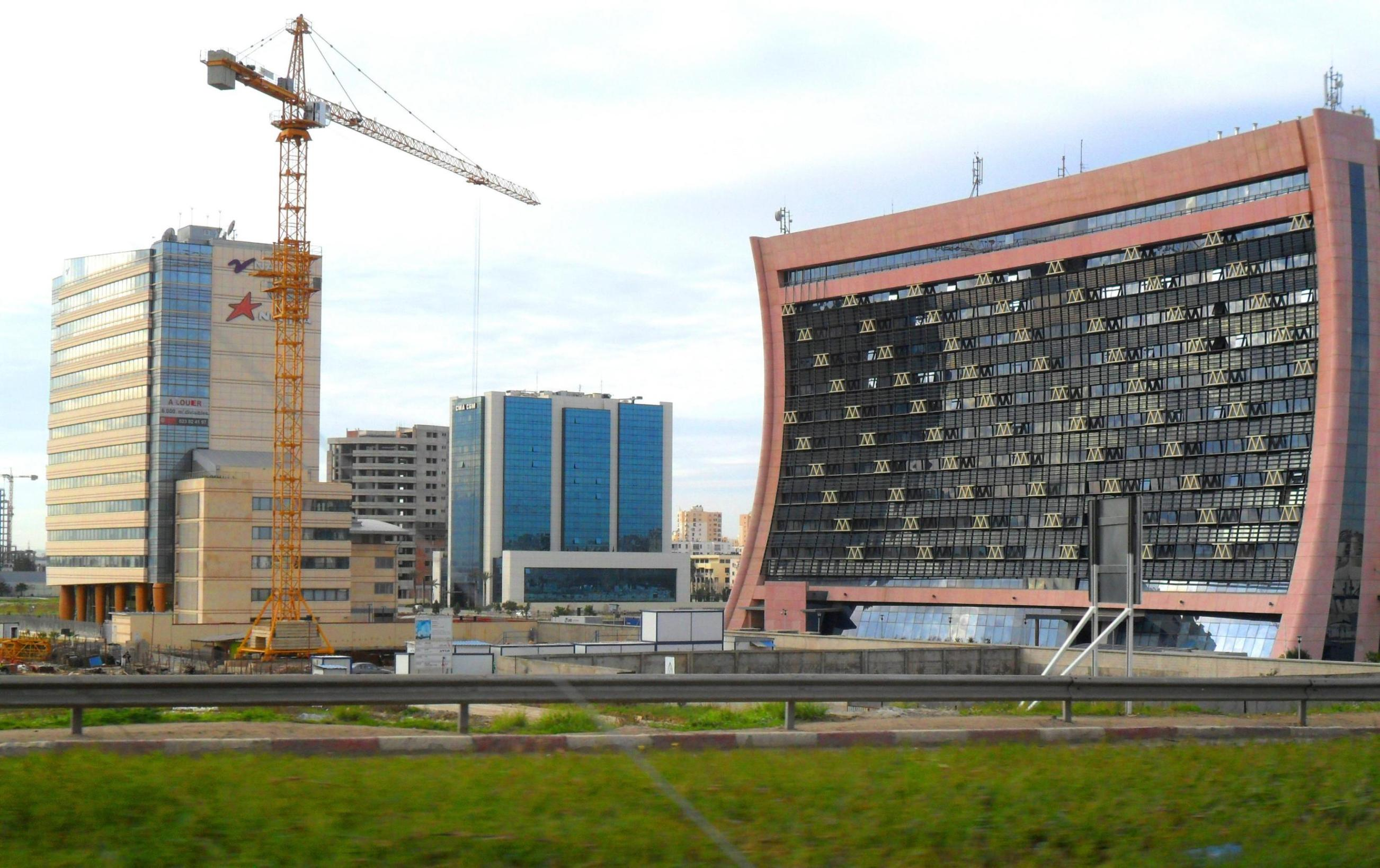 Mobilis